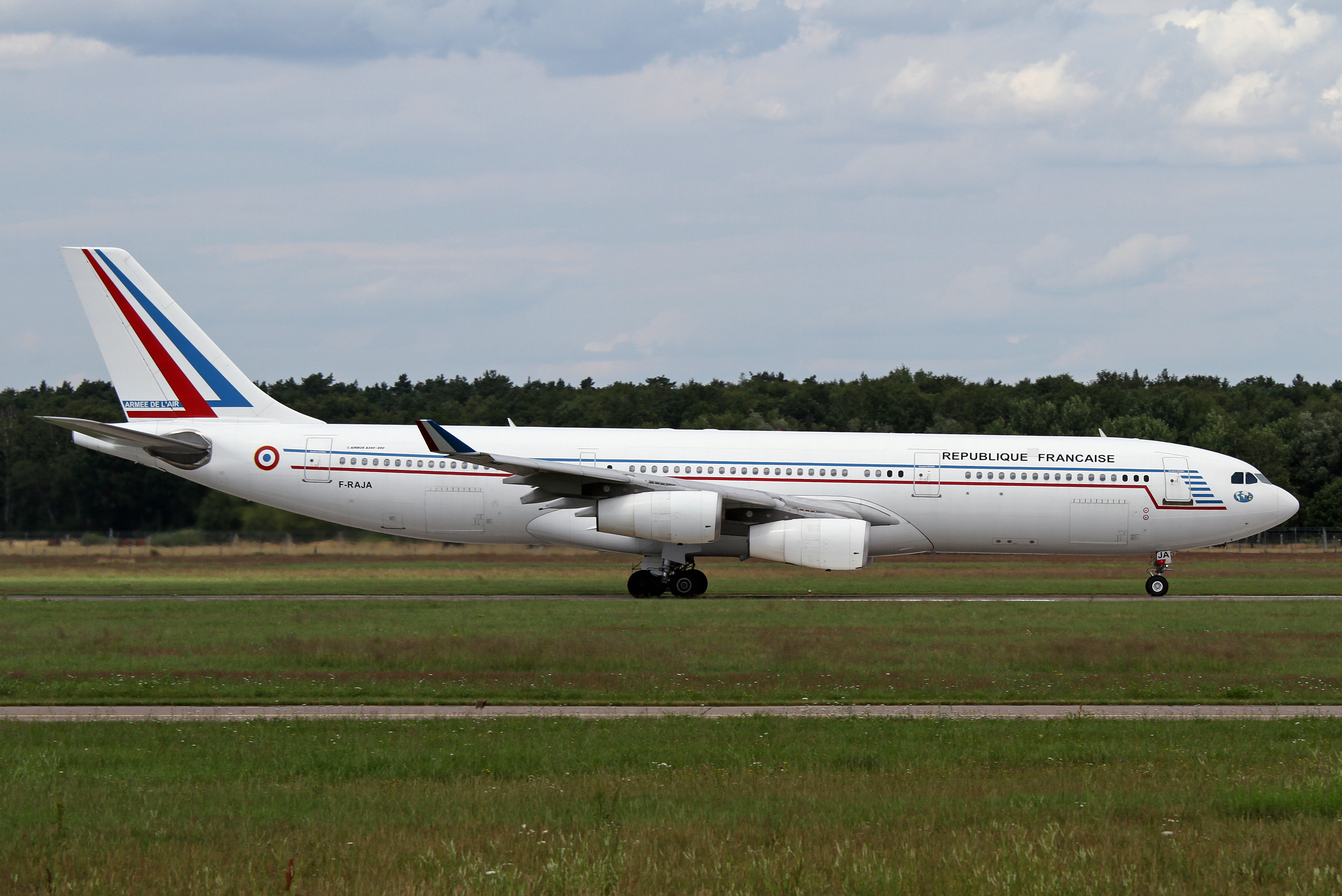 HAJ/EDDV 07-07-11